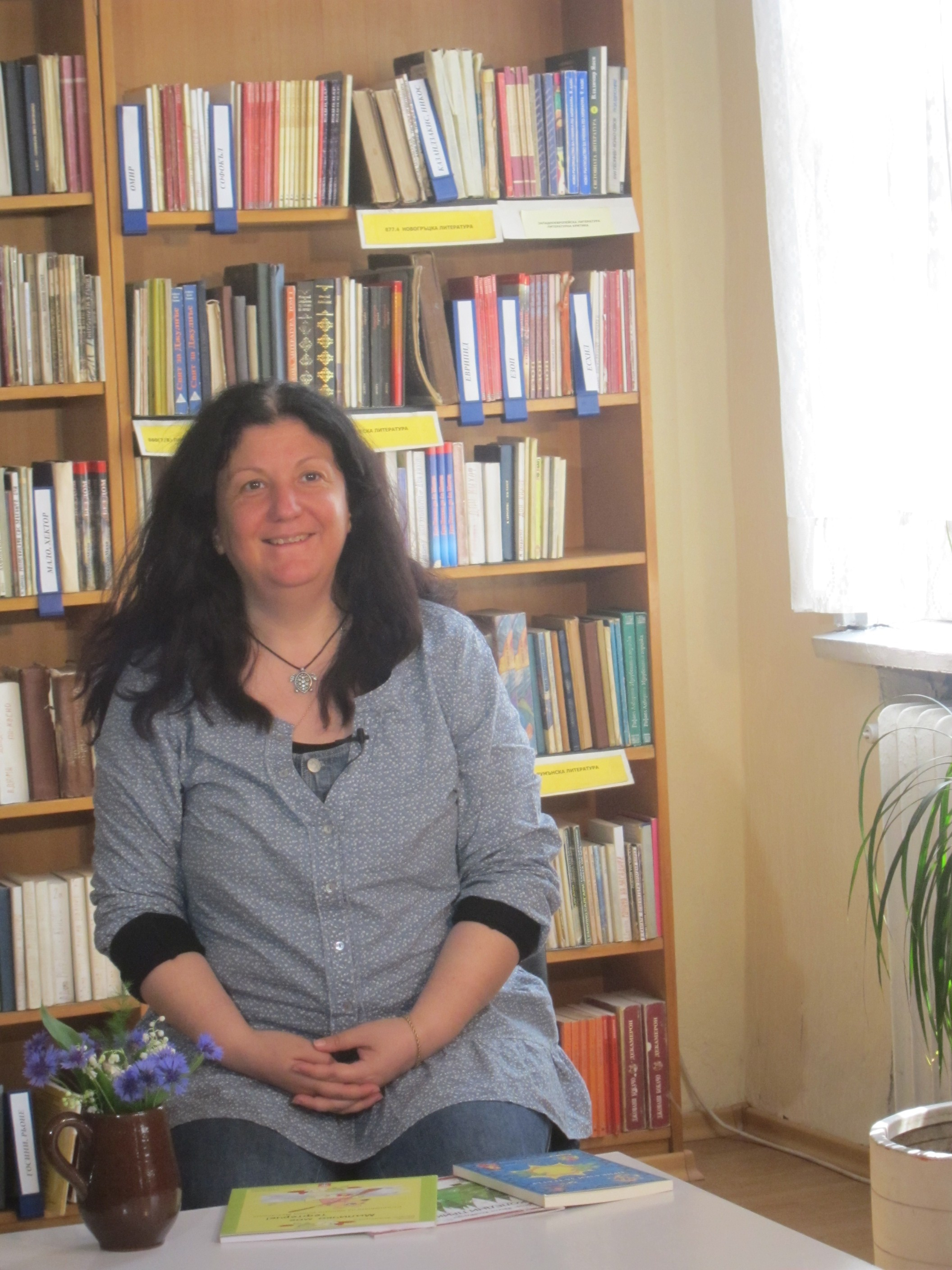 Весела Фламбурари